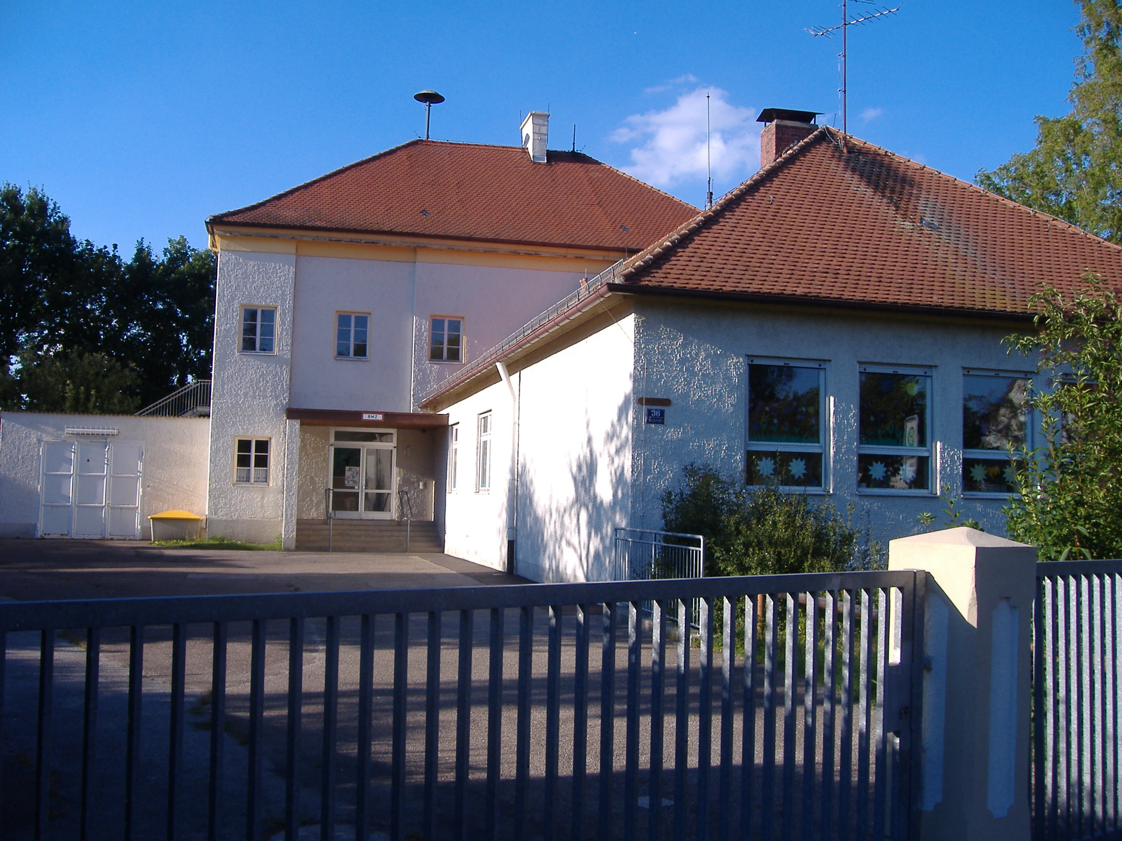 Die Grundschule in Hundszell Now commons Unfug, dort gibt es diese Datei nicht! --Enzian44 (Diskussion) 22:43, 24. Nov. 2013 (CET)